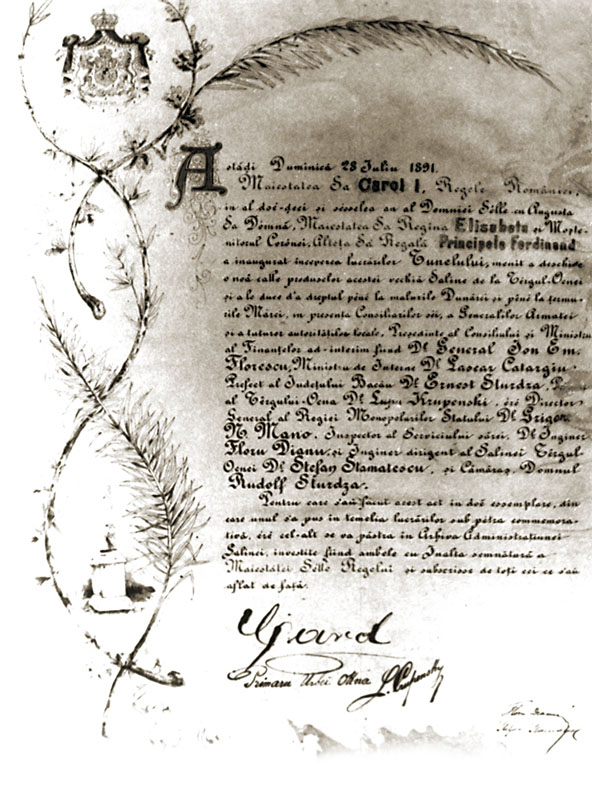 Documentul eliberat la 28 iulie 1891 ce prezintă inaugurarea de către Carol I şi Elisabeta a tunelului de extracţie din galeria G401. Astăzi Duminică 28 iulie 1891 Maiestatea sa Carol I. Regele României în al doi-şeci şi cincilea an al Domniei Sale cu Ru.. sa Doamnă, Maiestatea Sa Regina Elisabeta şi Moște-nitorul Coroanei. Alteţa Sa Regală Principele Ferdinand a inaugurat începerea lucrărilor Tunelului, menit a deschide o noă cale produselor acestei vechiă Saline de la Târgul. Ocnei şi a le duce duplul pîne la malurile Dunării şi pîne la ţărmu rile Mărcii, cu prezenţa Consiliorilor săi, a Genialelor Armatei şi a tuturor autorităţilor locale, Preşedinte al Consiliului şi Ministru al Finanţelor ad-interim fiind Dl General Ion. Em. Florescu, Ministru de Interne Dl. Lascăr Catargiu, Prefect al Județului Bacău Dl. Ernest Sturza, Primar al Tîrgului Ocna Dl. Lupu Crupenski, ... Director General al Regiei Monopolurilor Statului Dl. Grigor M. Mano, Inspector al Serviciului sării, Dl. Inginer Floru Dianu și Inspector dirigent al Salinei Tîrgul Ocnei Dl. Stefan Stamatescu și Cămăraș Domnul Rudolf Sturza. Pentru care iam făcut acest set de două exemplare, din care unul ia pus în temelia lucrărilor .... ...se va păstra în Cu... ...Salinei, investițiile fiind ambele cu Înalta semnătură a Maiestății Sale Regelui și subscris de toți cei sau aflat de față. Carol Primarul Tîrgului Ocna L. Crupensky